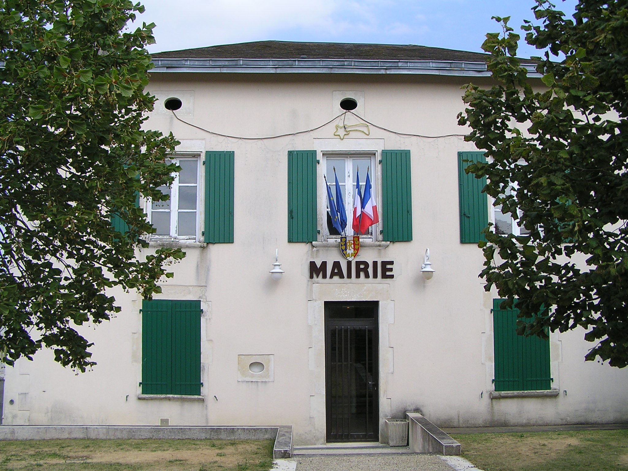 mairie de Montjean